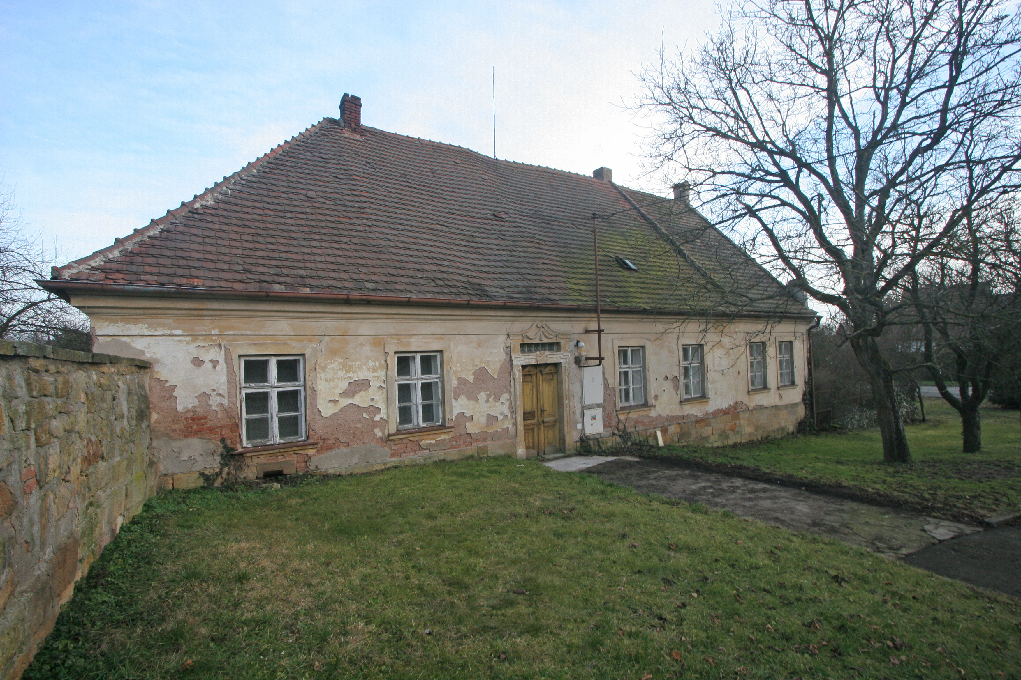 Ohnišťany fara